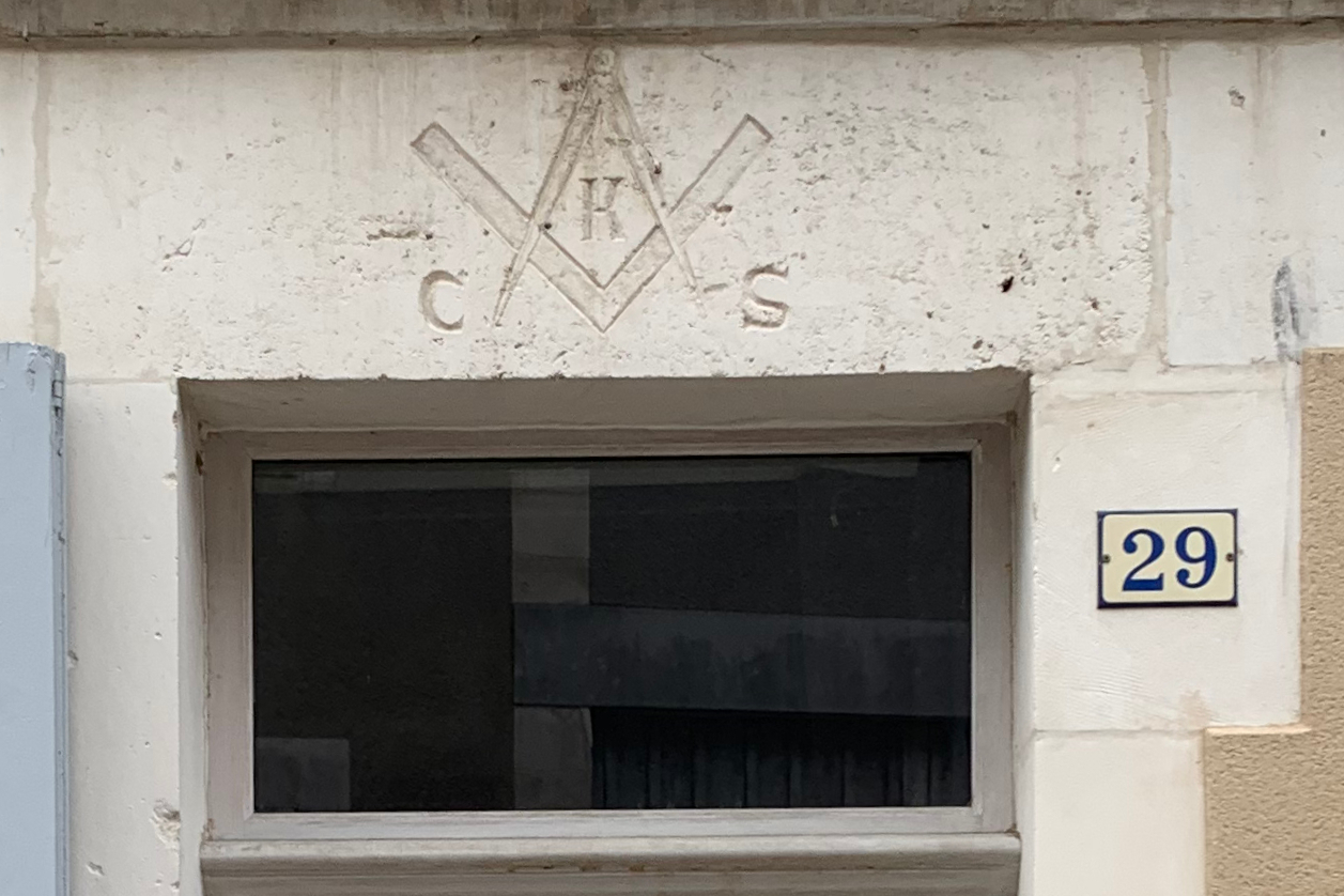 Maison à Irancy, rue Soufflot, avec le symbole C∴ K∴ S∴ (chevalier Kadosh).